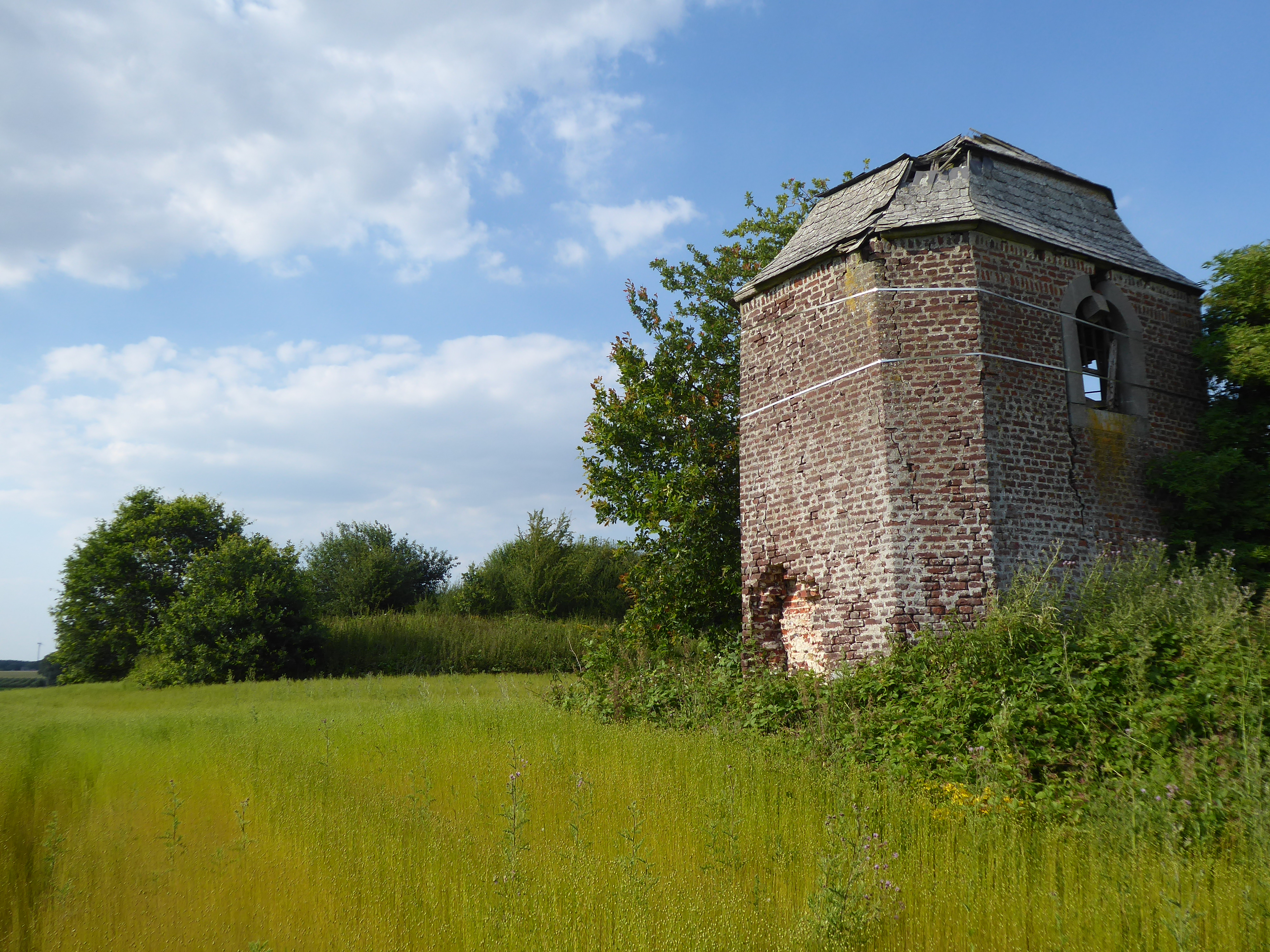 Chapelle Saint-Donat de Blehen (M) ainsi que la butte sur laquelle s'élève l'édifice et le tumulus voisin (S)